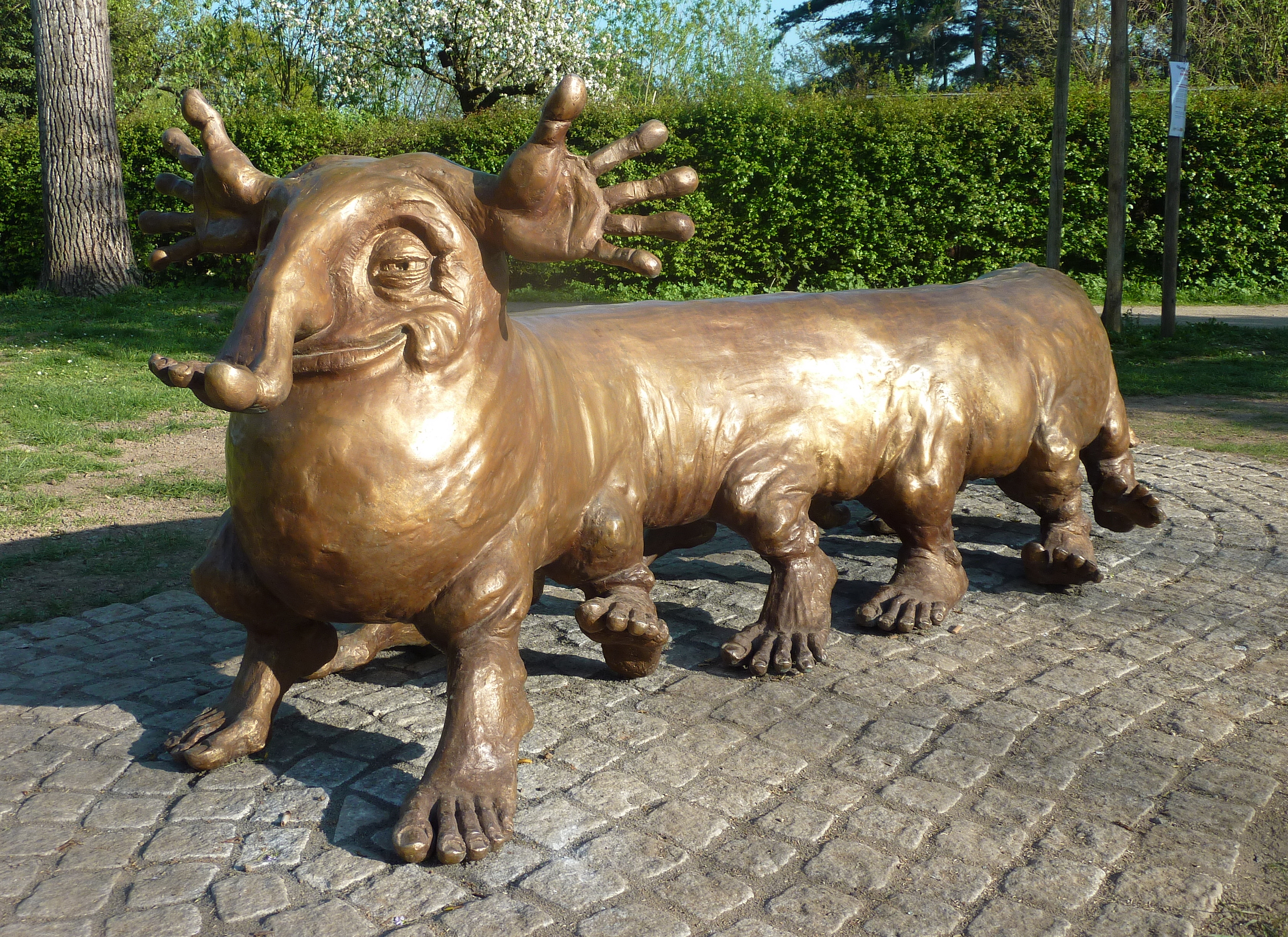 Komische Kunst im Frankfurter Grüngürtel: Der Barfüßer ist eine Bronzeplastik des Kasseler Bildhauers Siegfried Böttcher, geschaffen nach einer Vorlage des Frankfurter Zeichners und Satirikers Kurt Halbritter (1924–1978). Standort der im März 2017 enthüllten Skulptur ist die Kurt-Halbritter-Anlage am Ufer der Nidda in Frankfurt-Rödelheim